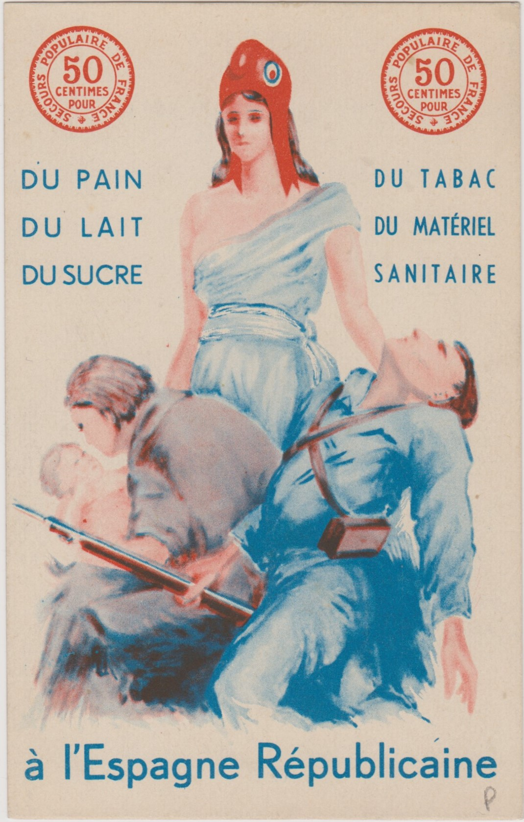 Au verso : Secours populaire de France, 97 rue Lafayette, Paris 10e.